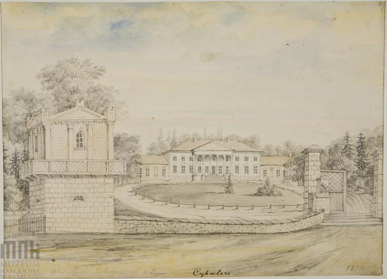 Cybulów - pałac Rohozińskich